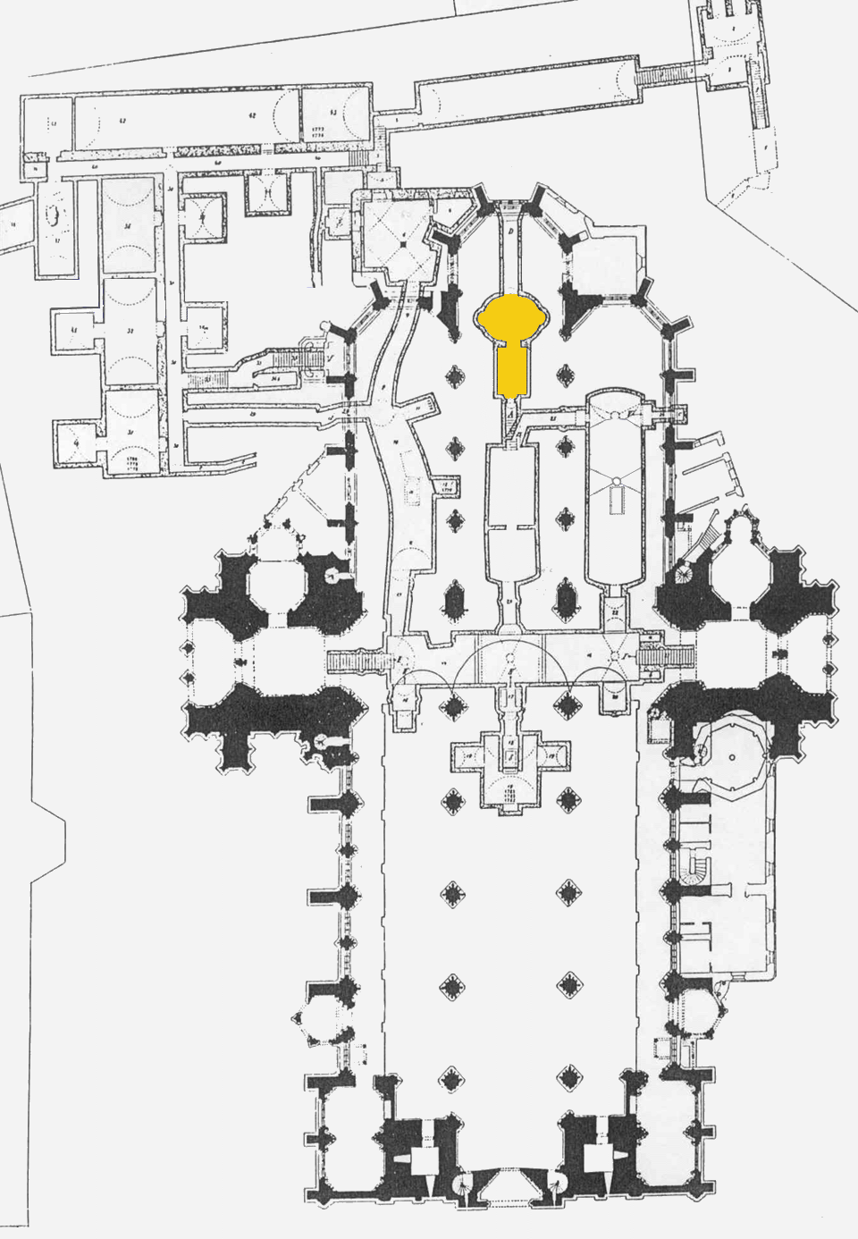 Stephansdom (Wien), Lage der Herzogsgruft in den „Katakomben von St. Stephan“